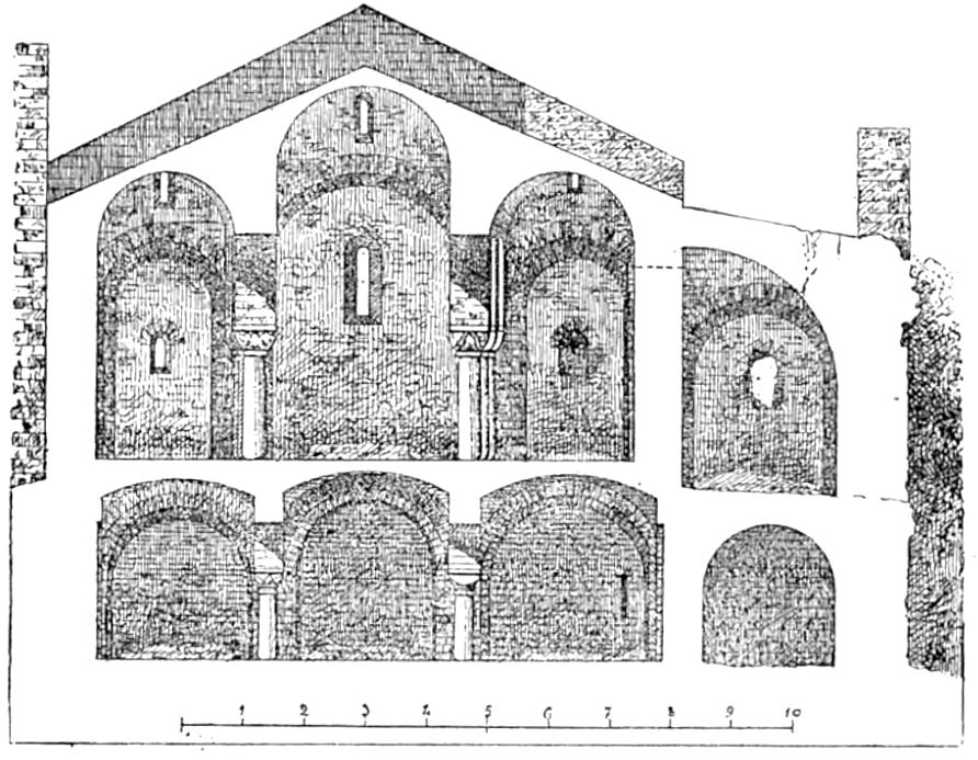 Coupe de l'abbatiale de Saint-Martin du Canigou par Jean-Auguste Brutails